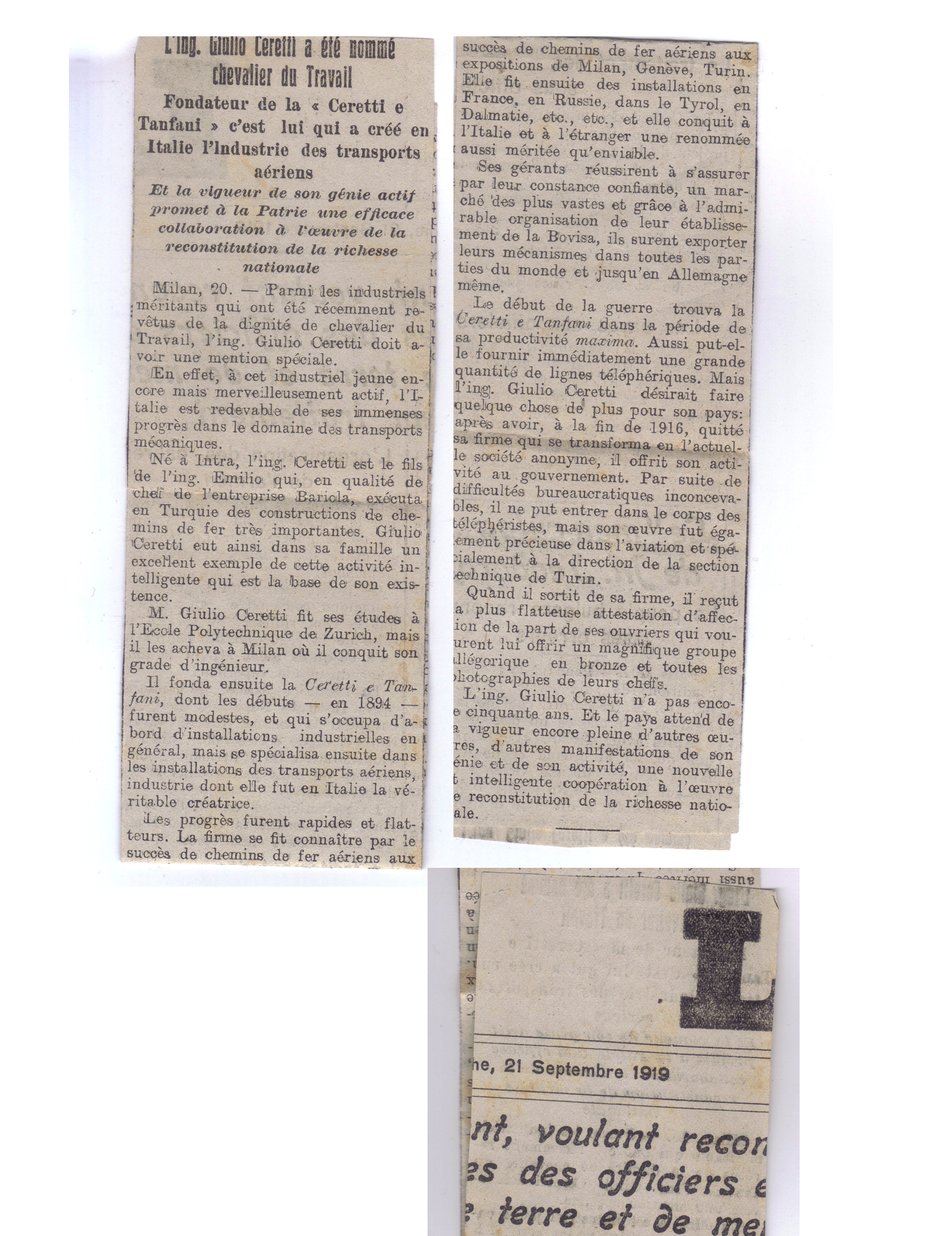 1919 - Ing Giulio Ceretti nominato Cavaliere del Lavoro